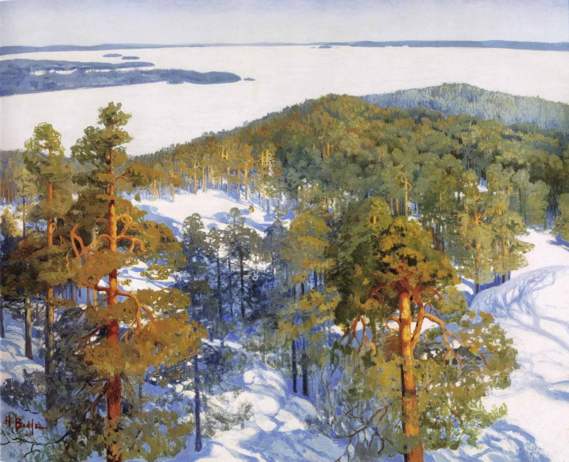 Helmi Biesen maalaus talvisesta näkymästä Tampereen Pyynikinharjulta.